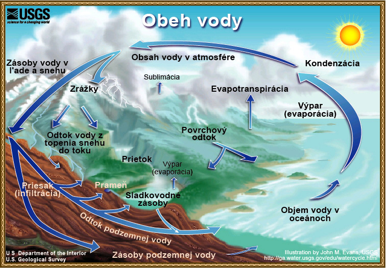 Schéma obehu vody.